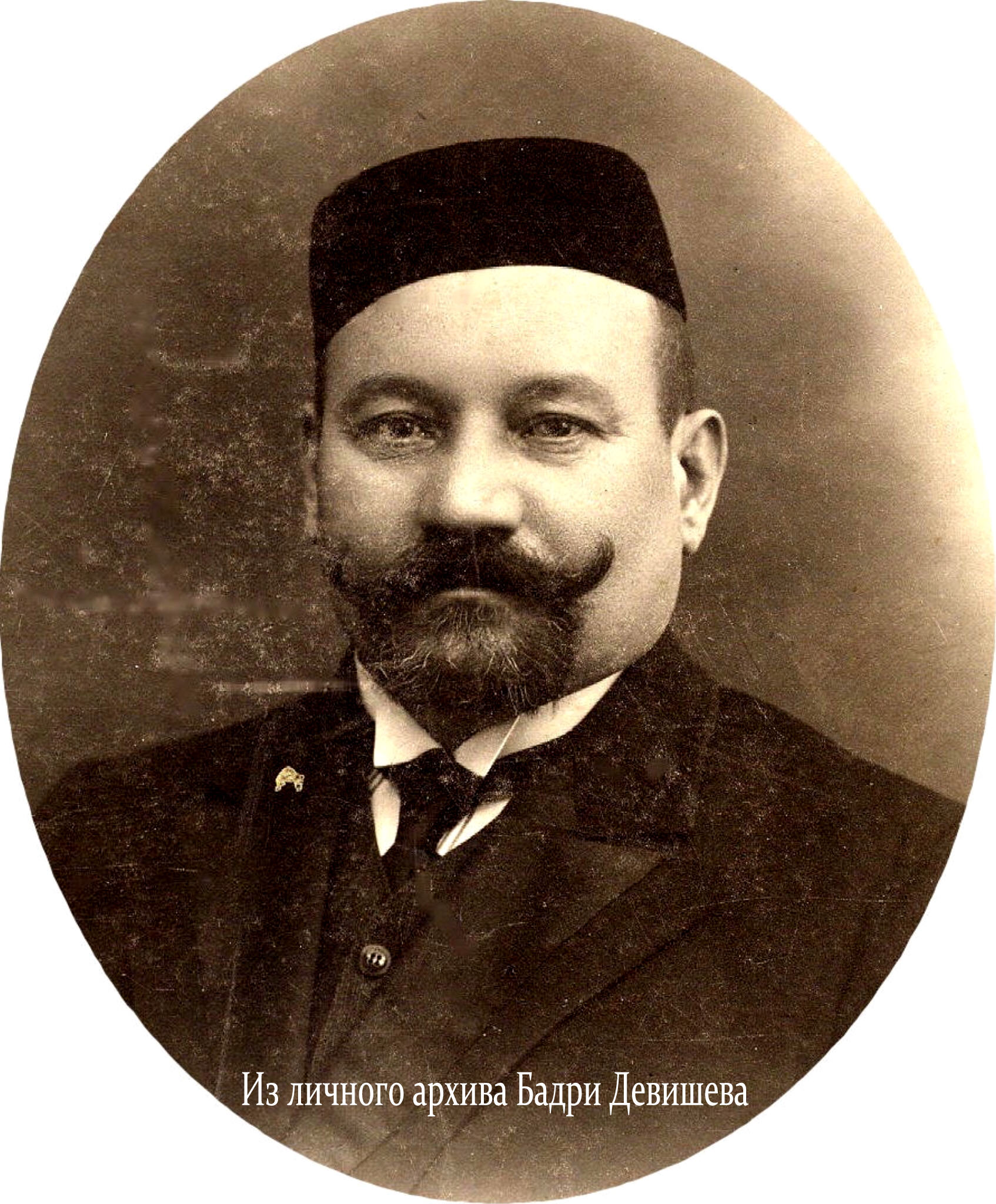 Зайнетдин Агафуров